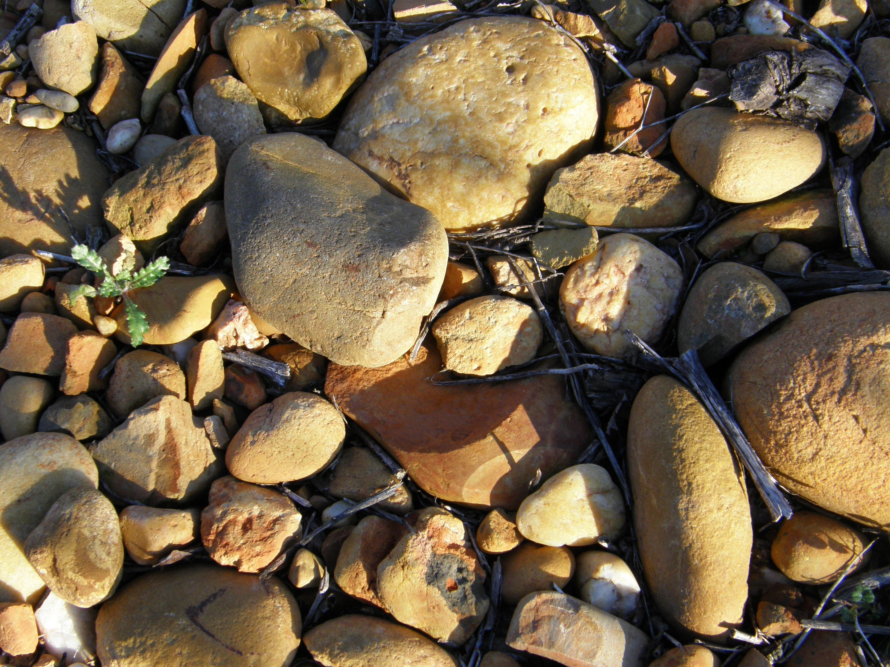 Galets patinés présents en nombre sur le plateau des Costières (Gard, France)